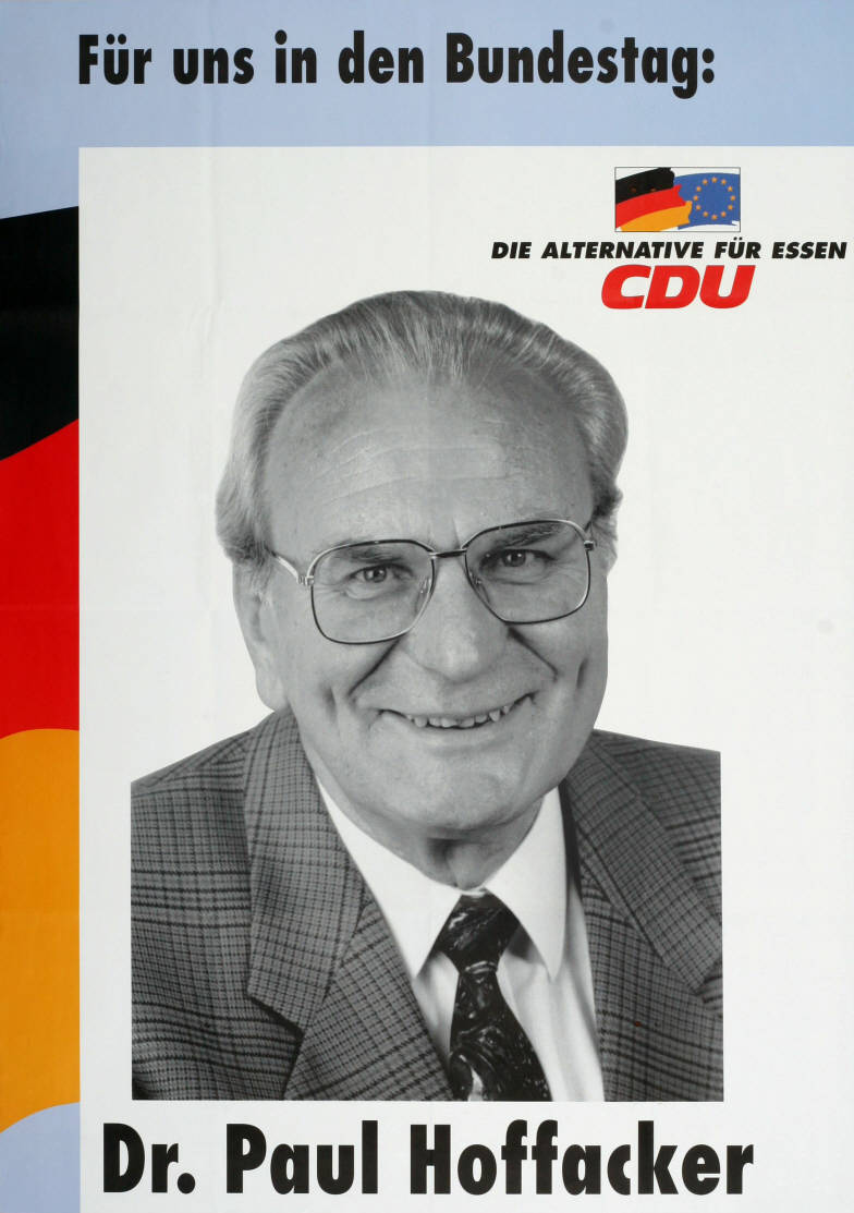 Für uns in den Bundestag: Die Alternative für Essen CDU Dr. Paul Hoffacker Abbildung:Porträtfoto - NationalfarbenPlakatart:Kandidaten-/Personenplakat mit PorträtObjekt-Signatur:10-001: 4047Bestand:Plakate zu Bundestagswahlen (10-001)GliederungBestand10-18:Plakate zu Bundestagswahlen (10-001) » Die 13. Bundestagswahl am 16. Oktober 1994 » CDU » Mit PorträtfotoLizenz:KAS/ACDP 10-001: 4047 CC-BY-SA 3.0 DE